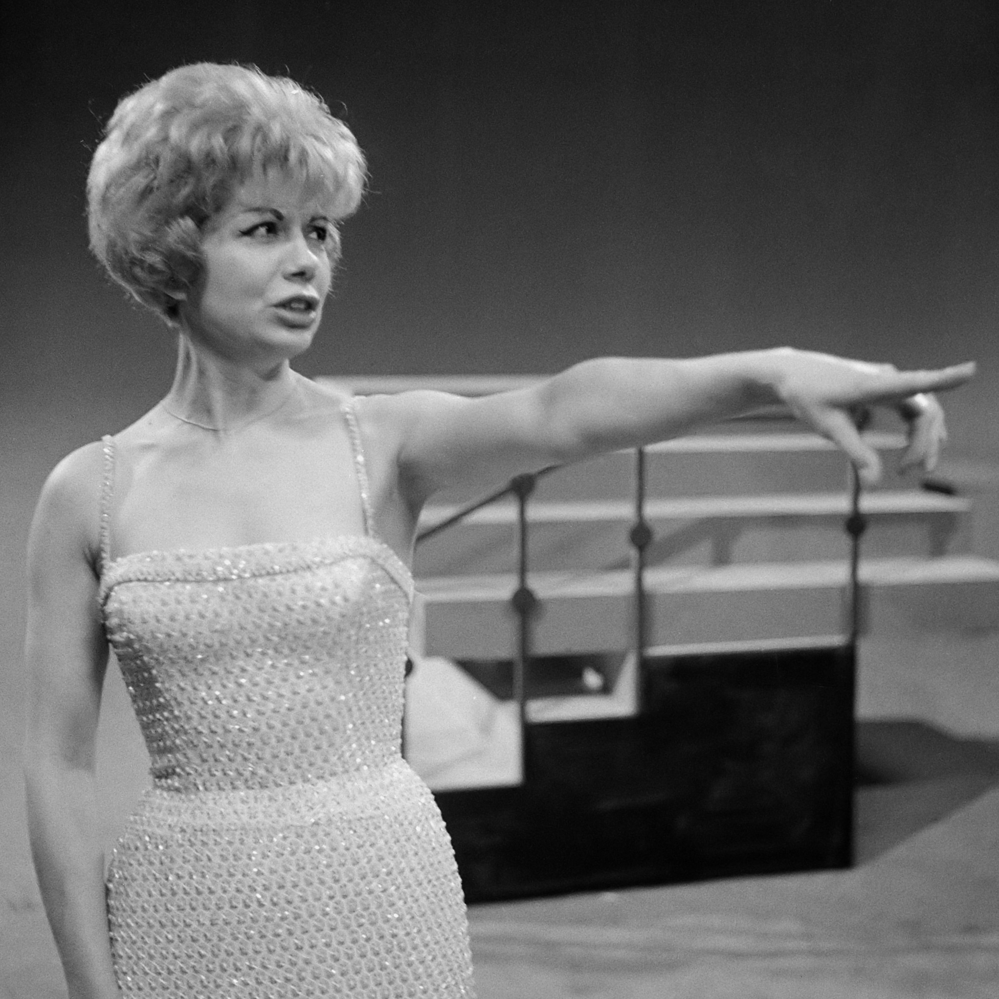 TV "Zaterdagavondaccoorden". Franse chansonniere Jacqueline François 14 januari 1962